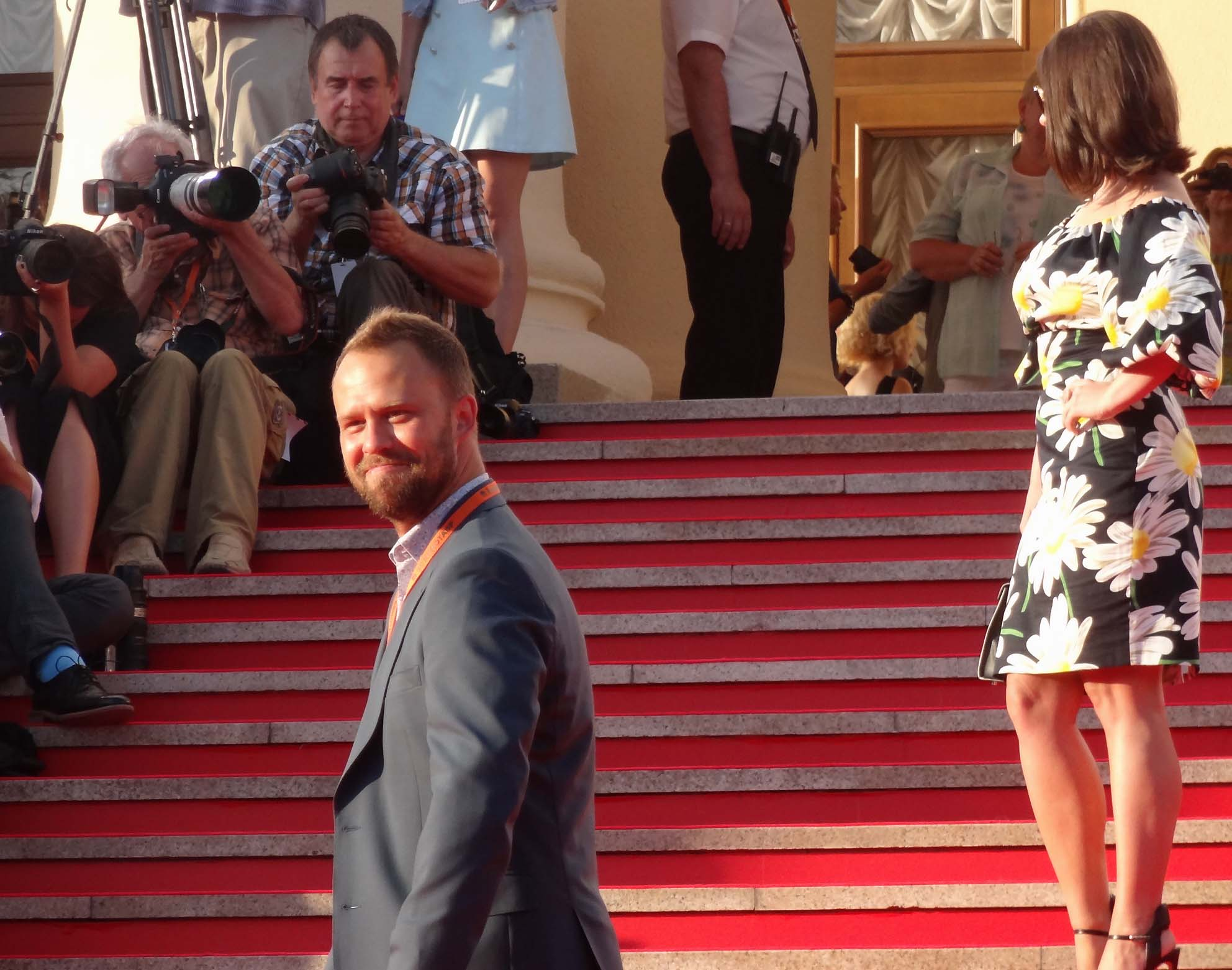 Кири́лл Влади́мирович Плетнёв — российский актёр театра и кино. Сочи, кинофестиваль "Кинотавр - 2015"